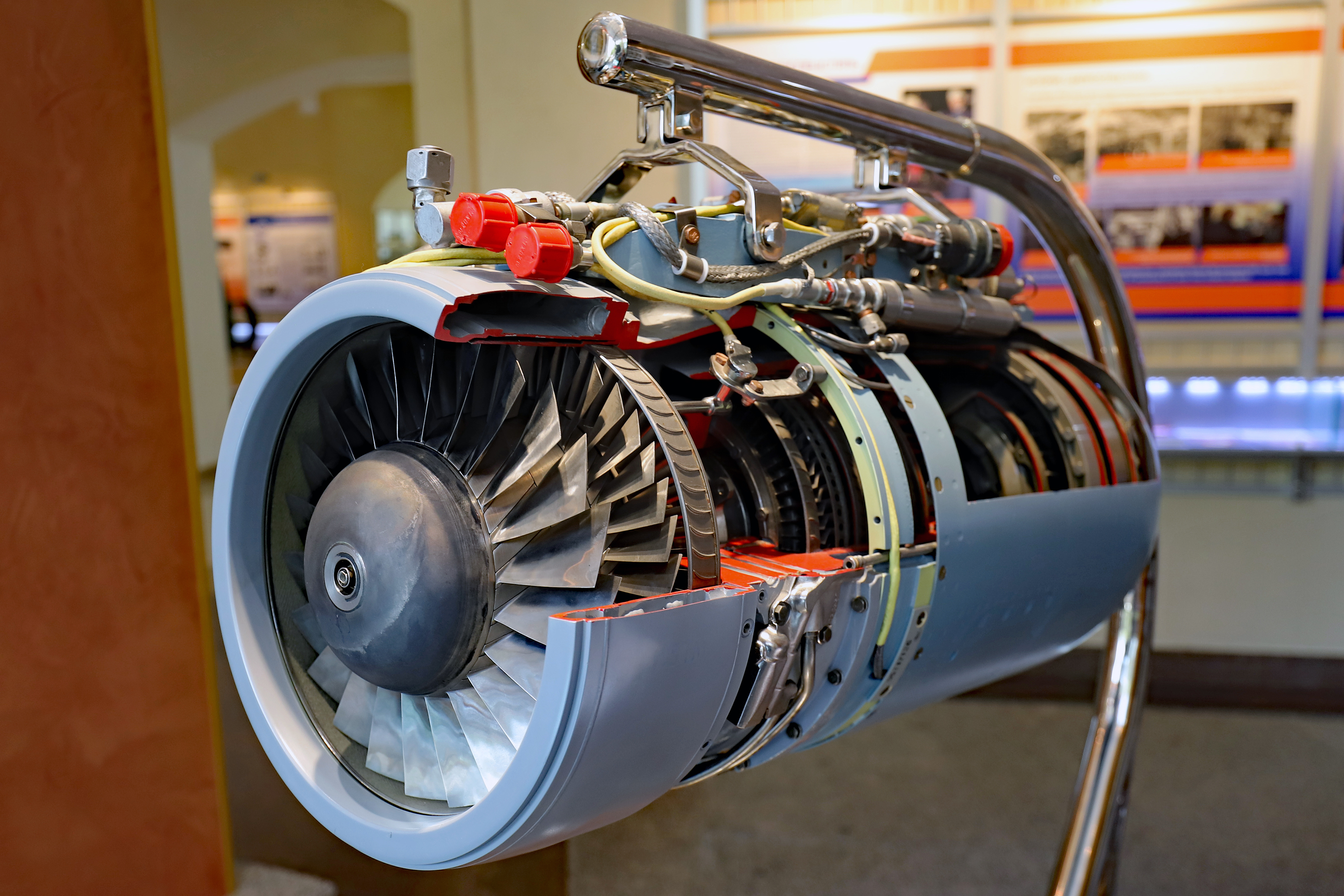 Schnittmodell des Turbofan-Triebwerk R-95-300 im Museum Motor-Sich.